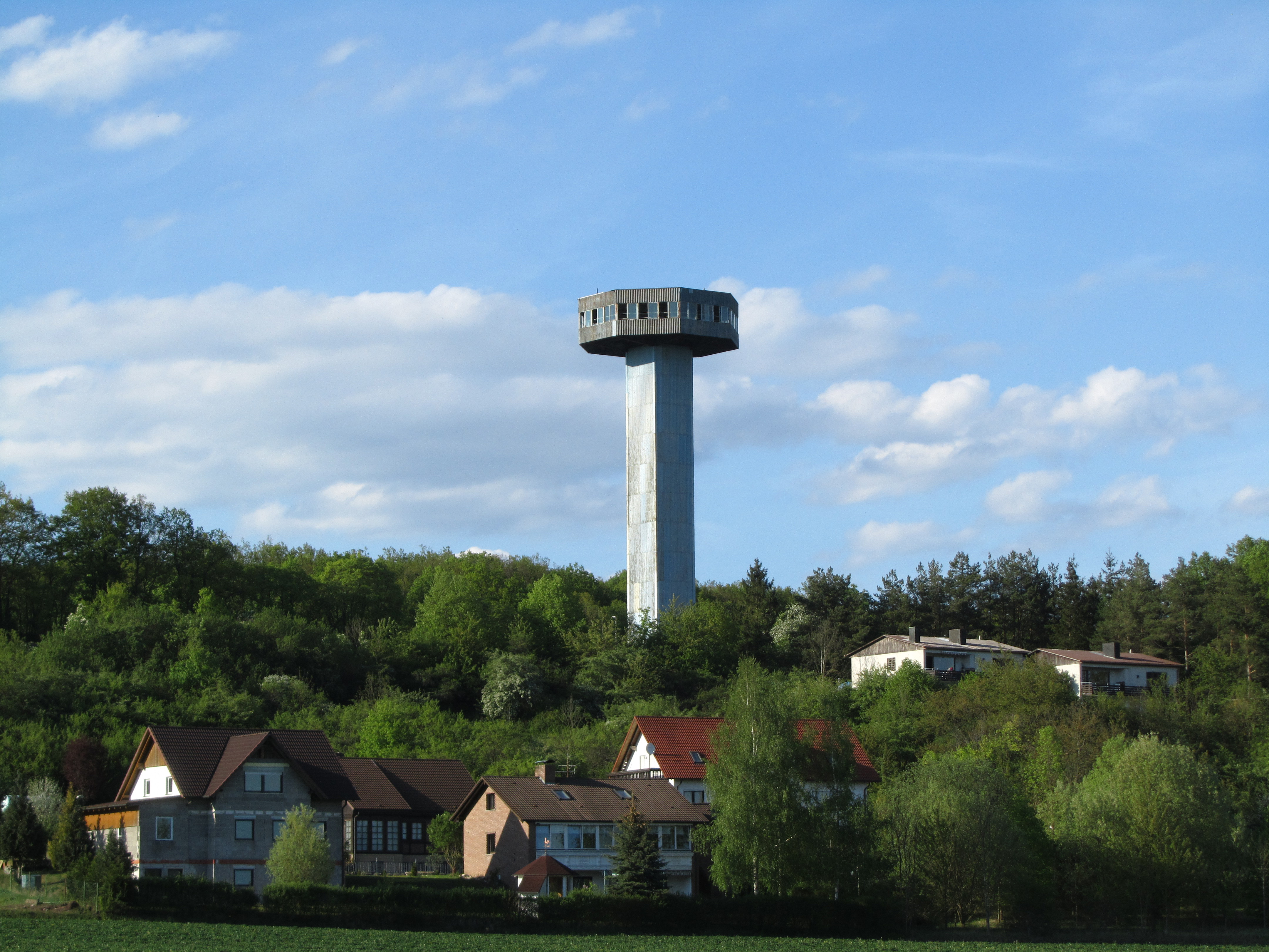 Der Bayernturm auf dem Büchelberg in den Haßbergen. Im Vordergrund Teile der Ferienhaussiedlung Büchelberg bei Zimmerau.